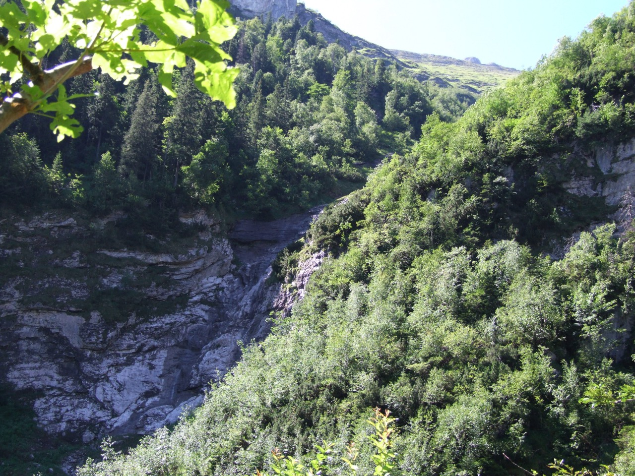 Fragment progu poniżej Szerokiej Doliny Bielskiej i spadająca z niego Reglana Siklawa